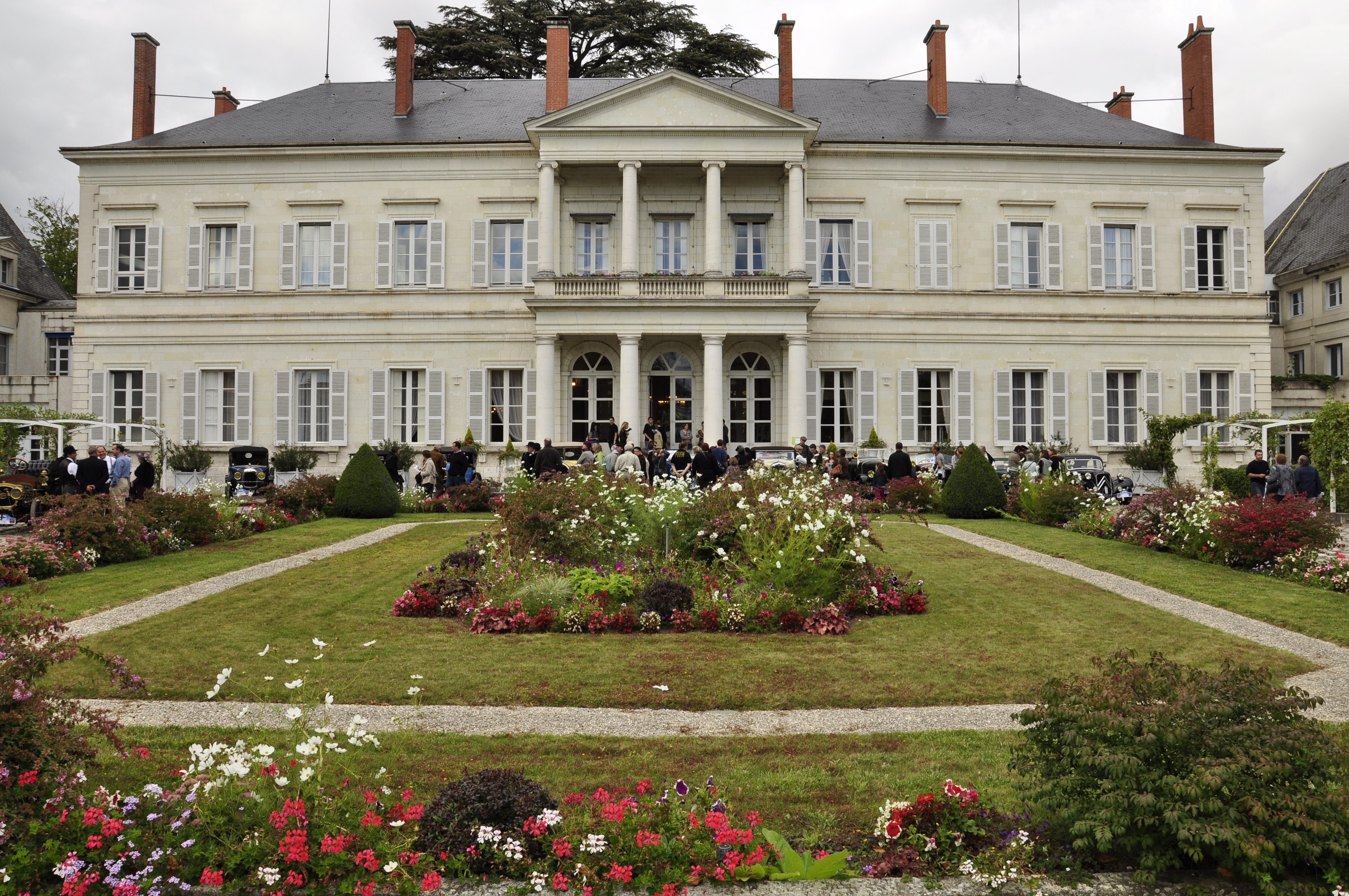 Préfecture du Loir et Cher à Blois (41000) .